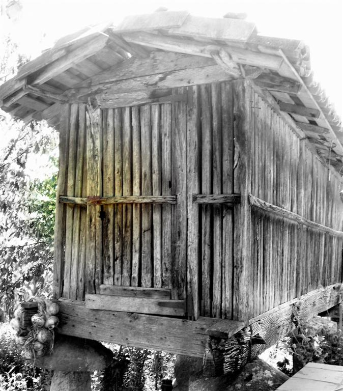 Canasto, provincia de Ourense